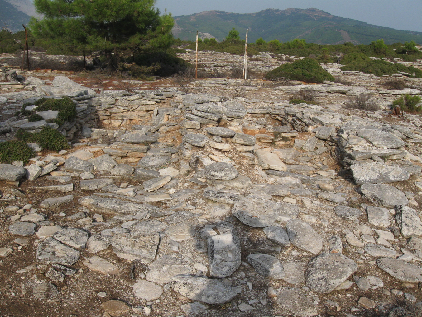 Steinkistengräber Larnaki